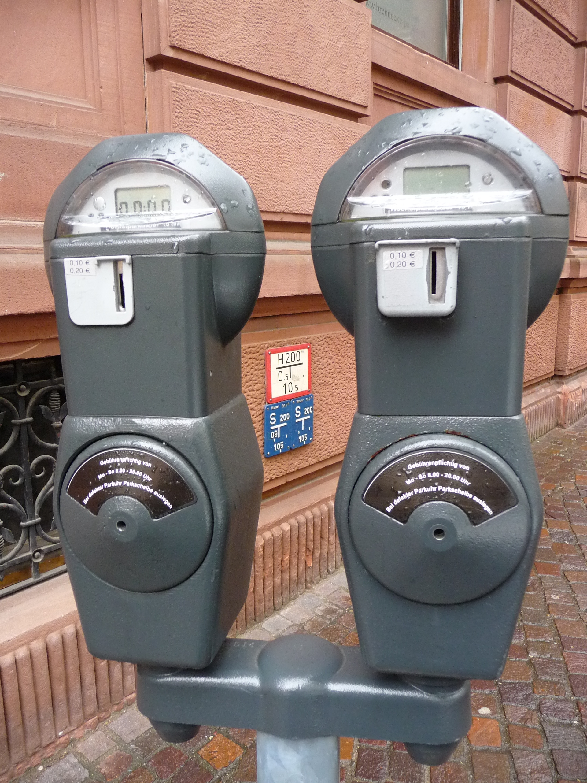 Zwei Parkuhren im Bäderviertel in Baden-Baden (Baden-Württemberg, Deutschland)